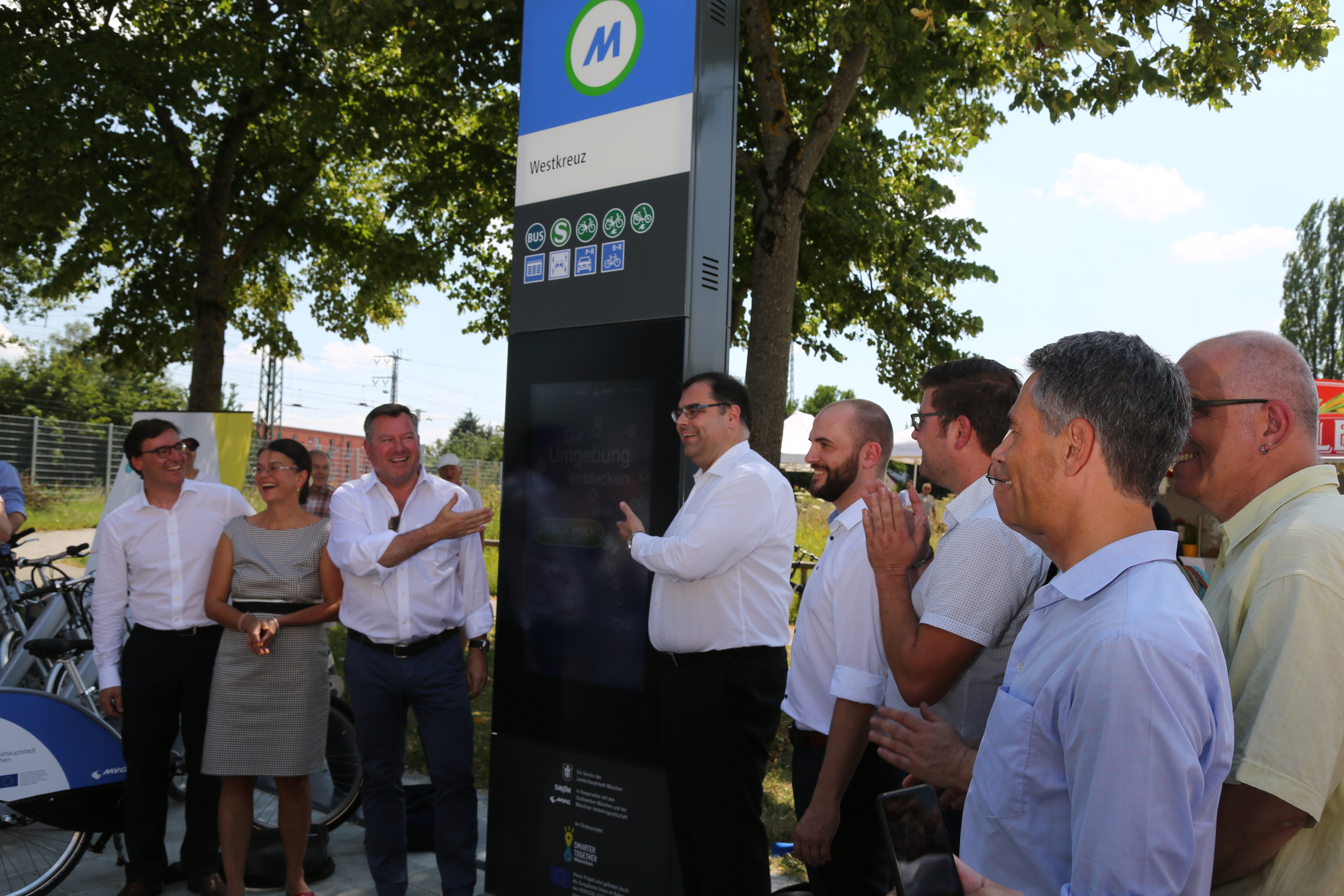 Eröffnung des Projekts Smarter Together im Müchner Modellstadtteil Neuaubing-Westkreuz am 2018-07-27. München, Wien und Lyon sind die Projektstädte eines EU-Projektes, in dem realisierbare Techniken der Smart City umgesetzt und im Massenmarkt getestet werden. Zu den Projekttechnologien gehört Mobilität mit Carsharing von Elektroautos, Mietfahrrädern, Miet-Pedelecs und E-Lastenrädern, Abhol- und Bringsysteme mit Quartierboxen. Förderung von Energie-Projekten im Bestandsbau und Sensorik im öffentlichen Raum. Von links: Christian Amlong, GWG; Elisabeth Merk, Stadtbaurätin; Josef Schmid, CSU, Zweiter Bürgermeister, Referent für Arbeit und Wirtschaft; Ingo Wortmann, MVG; Maximilian Bründl, Stattauto-München